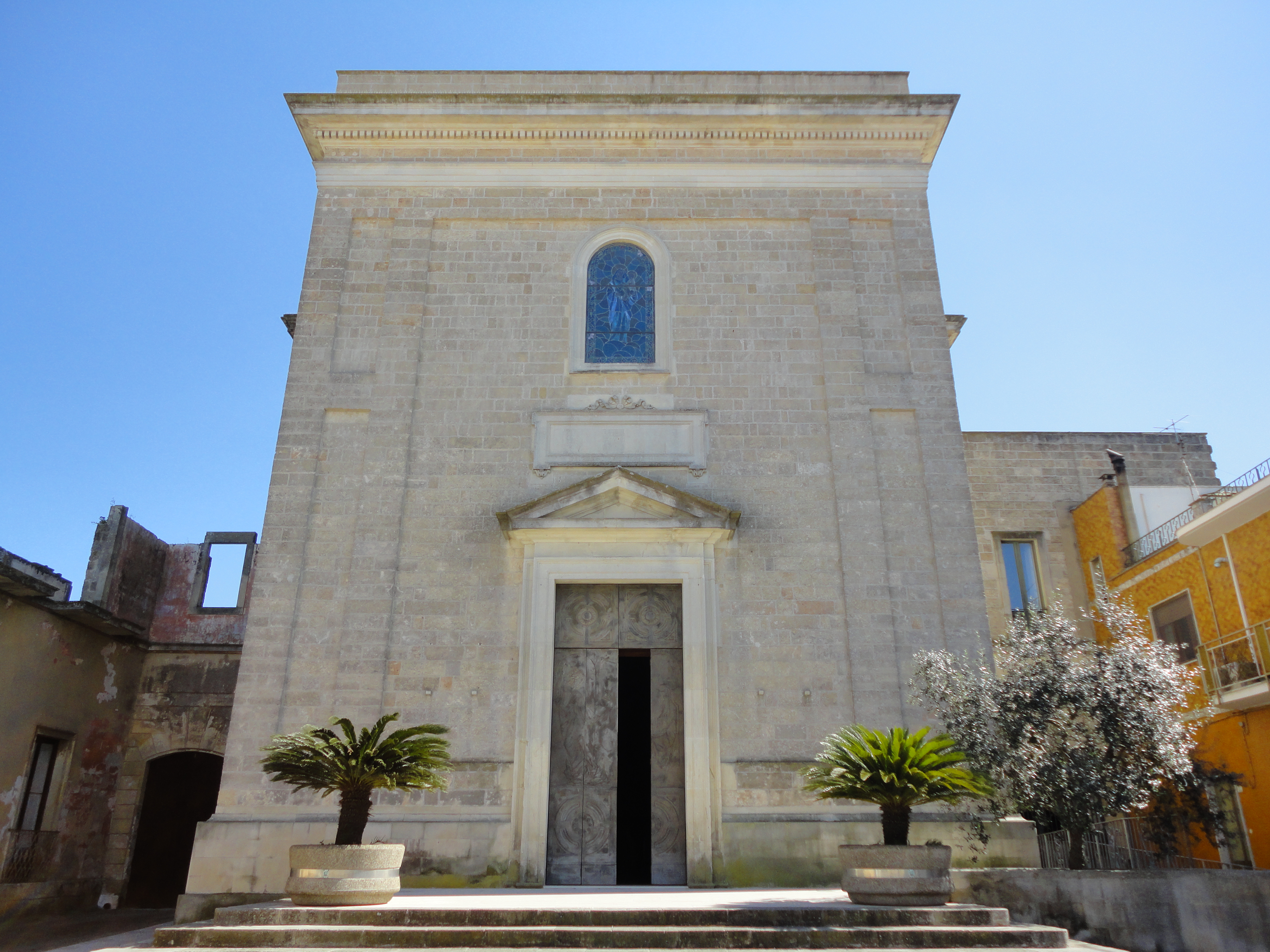 Chiesa Madre di Collepasso, Lecce